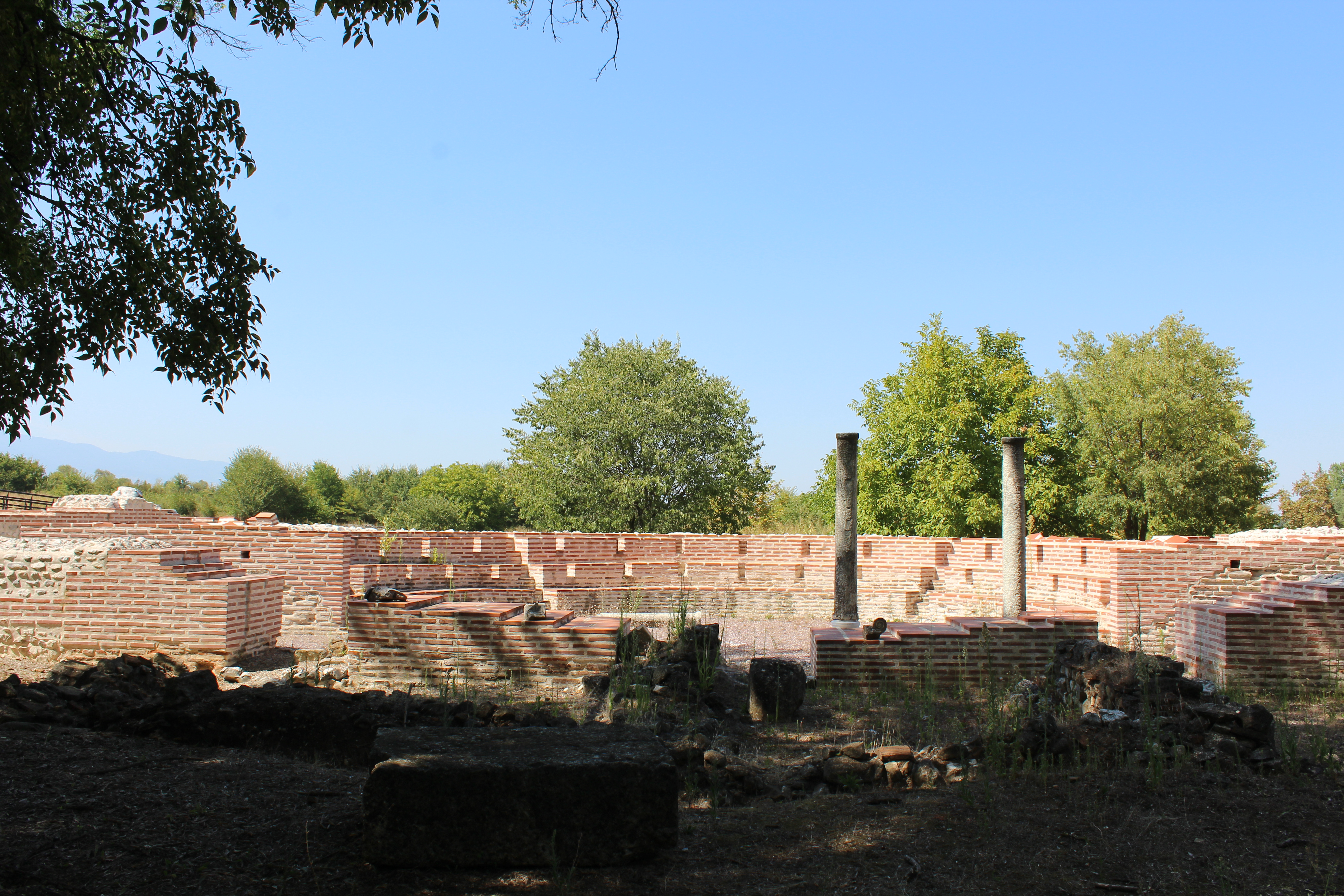 Μεγάλες θέρμες Δίου«Μεγάλες θέρμες Δίου»